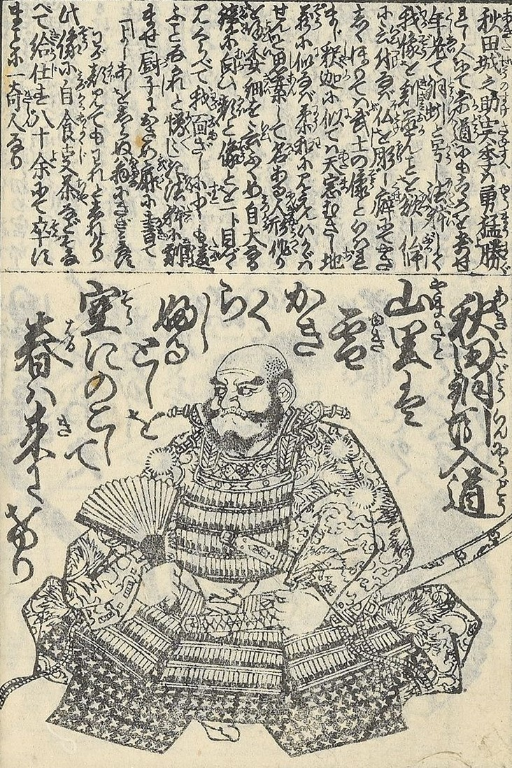 秋田実季の木像。